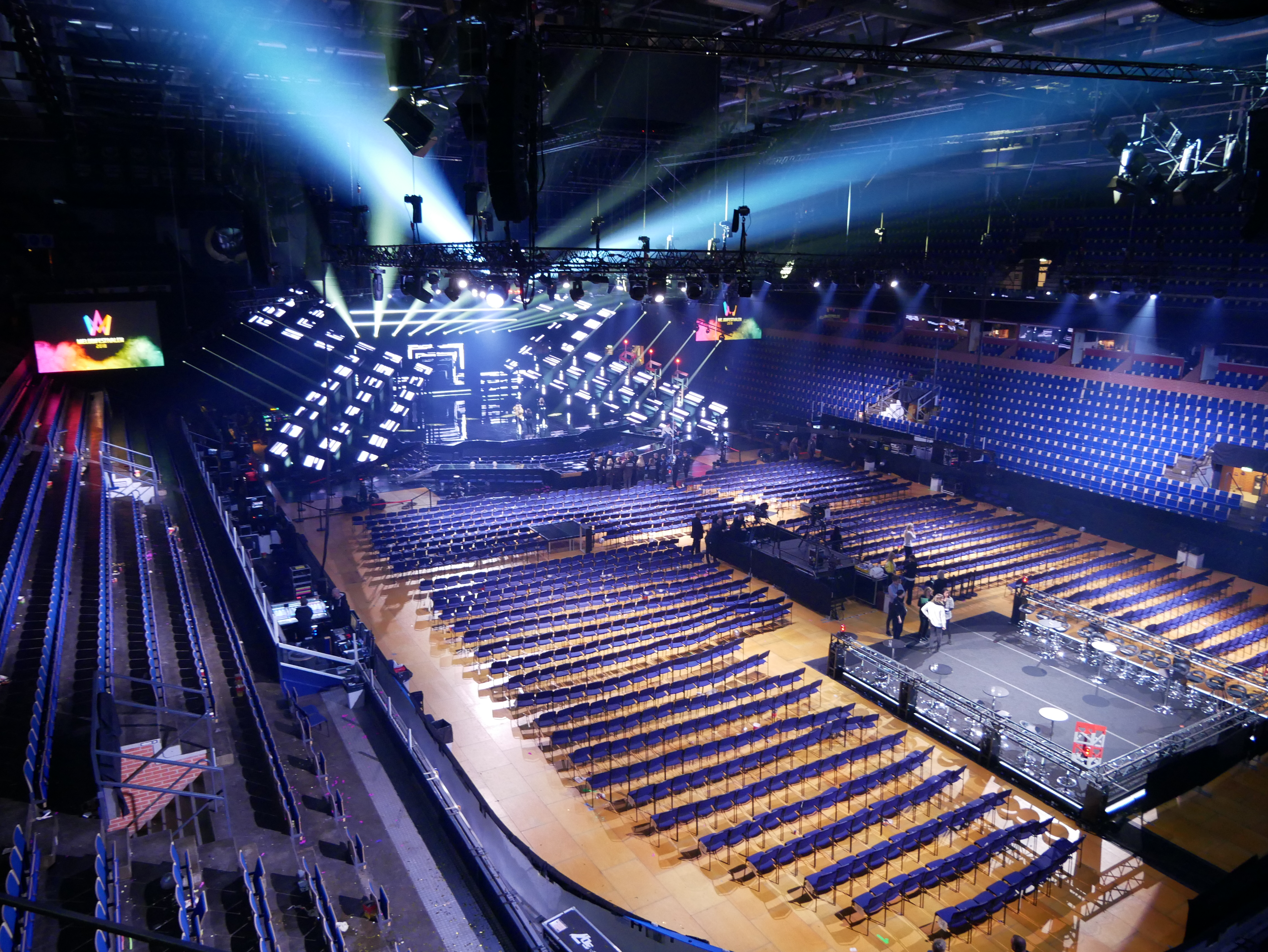 Melodifestivalen 2018, Deltävling 1, Löfbergs Arena, Karlstad Löfbergs arena, Karlstad, Melodifestivalen 2018